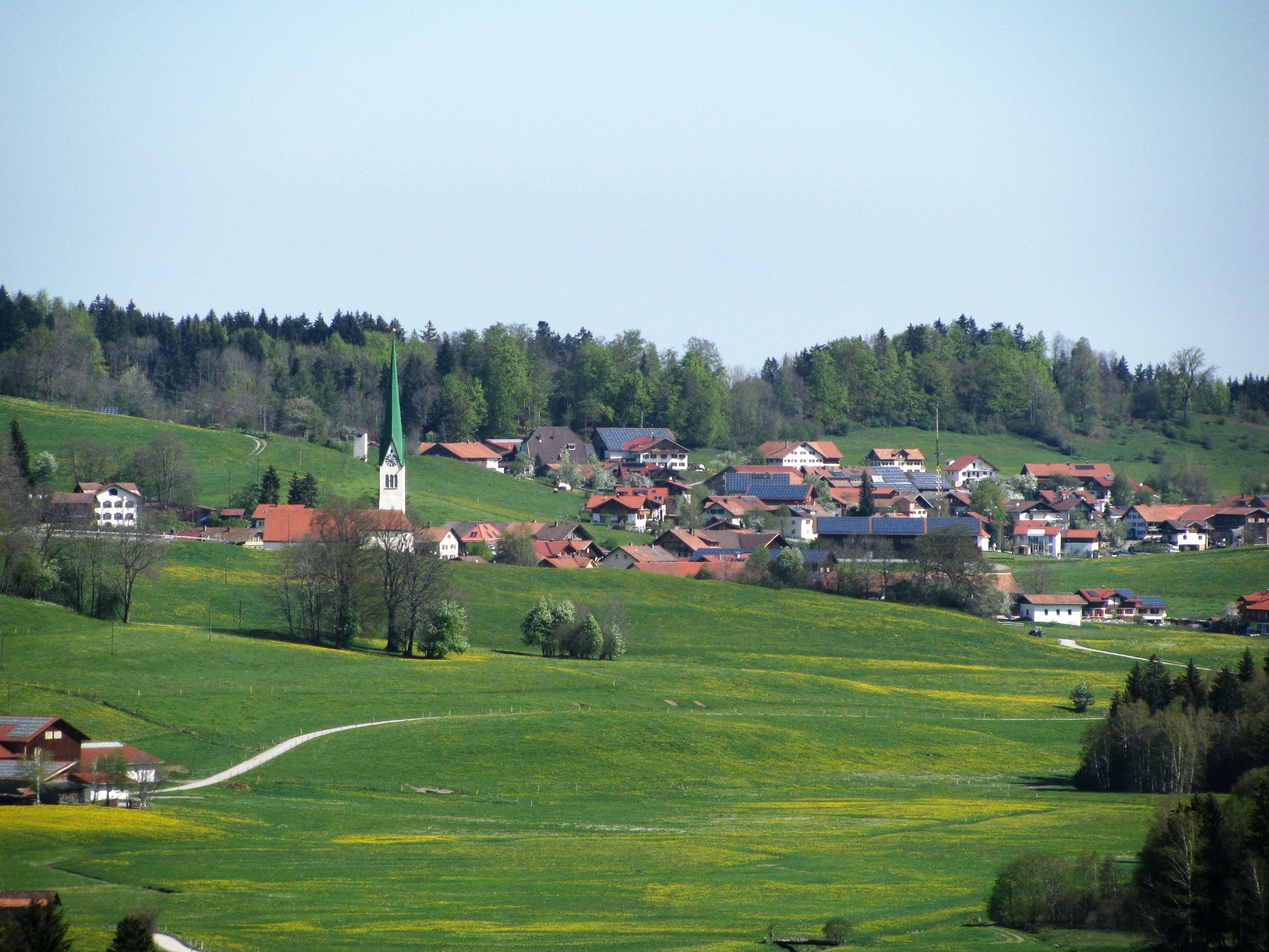 Vorderburg und Großdorf aus Südsüdwesten